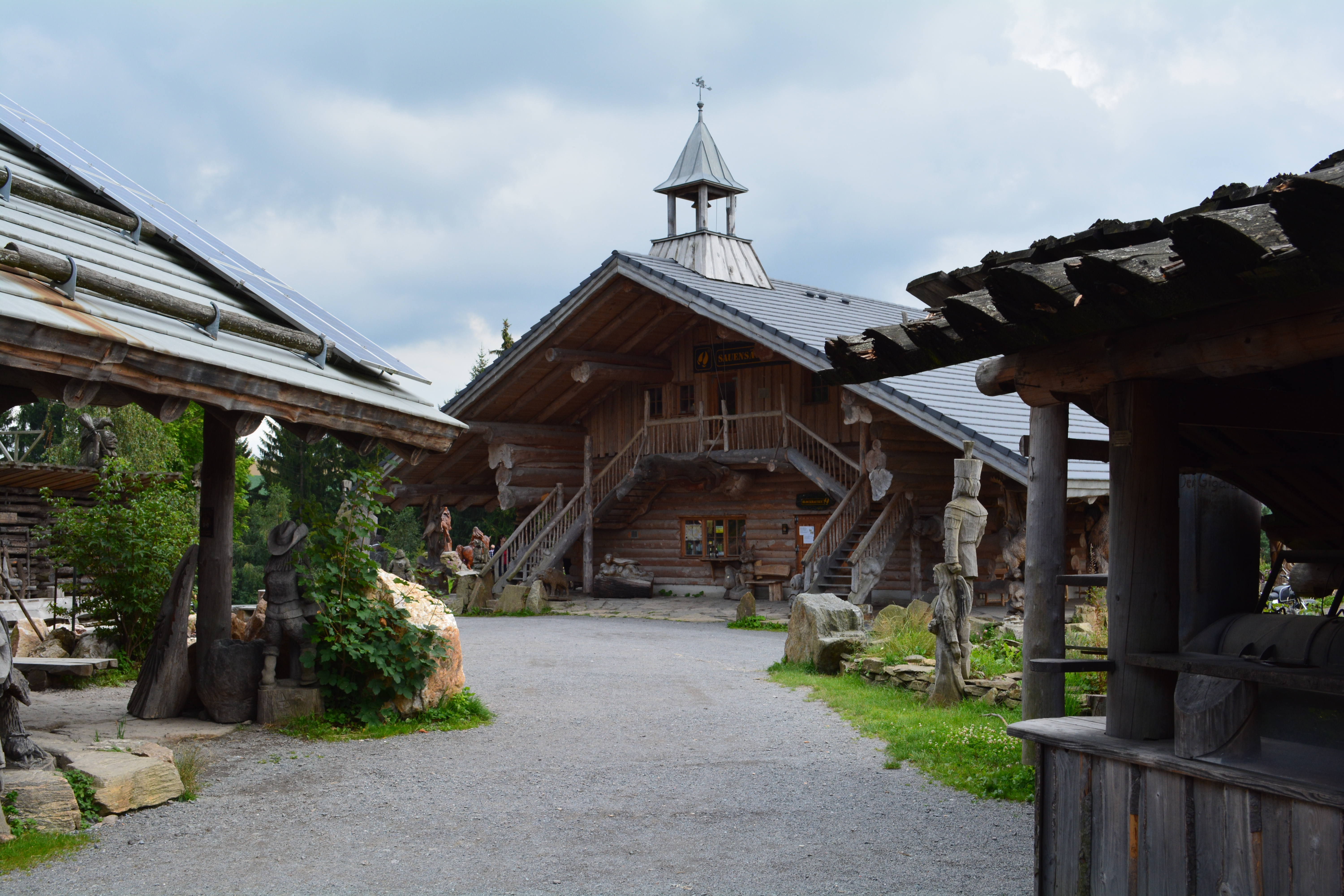 Blockhausen: Kettensägen-Schnitzen, Große Hütte